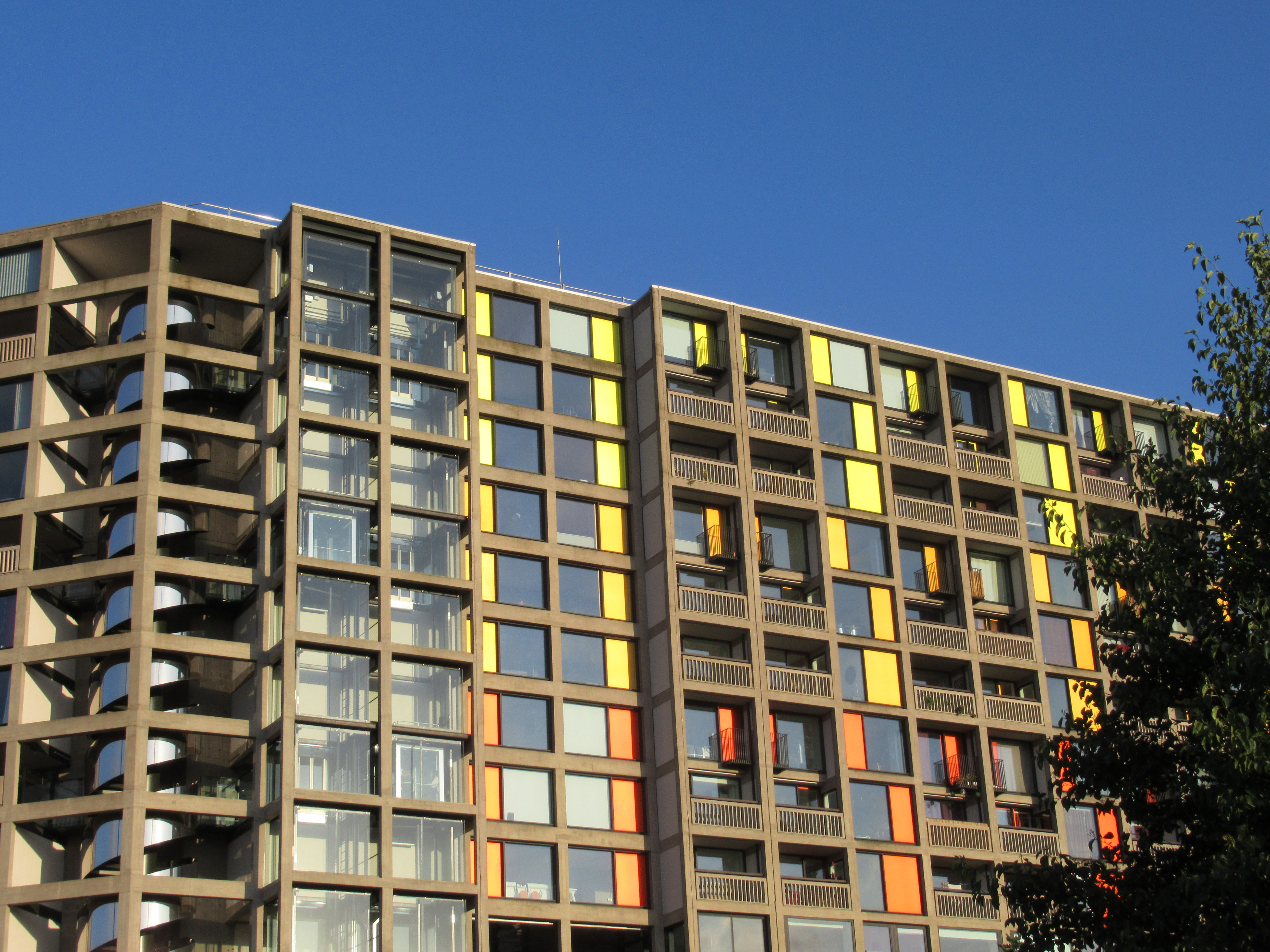 Park Hill